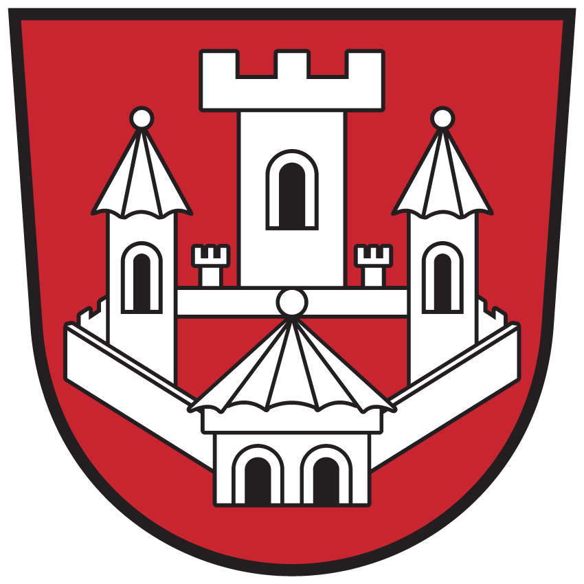 Wappen von Friesach